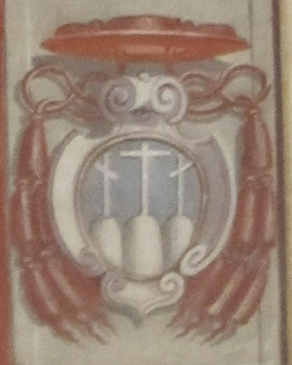 Stemma card. Egidio da VT, affresco XVII sec., part., Sala Regia, Palazzo de Priori, Viterbo